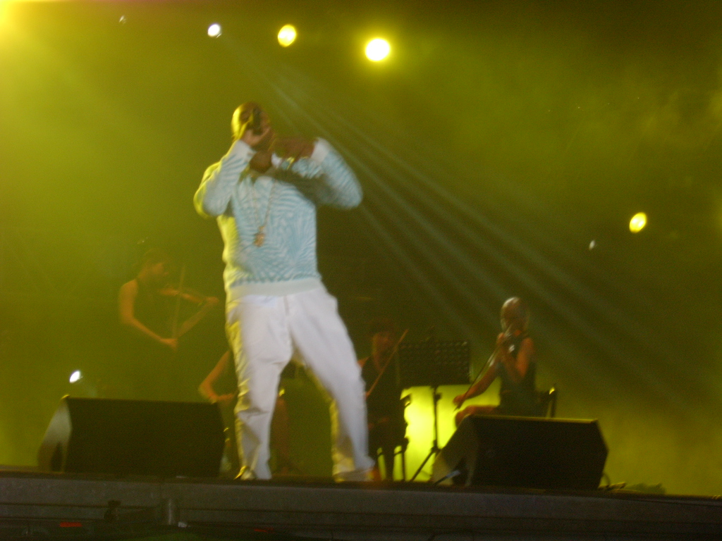 pl: Kanye West na Festiwalu Heineken Open'er 2006